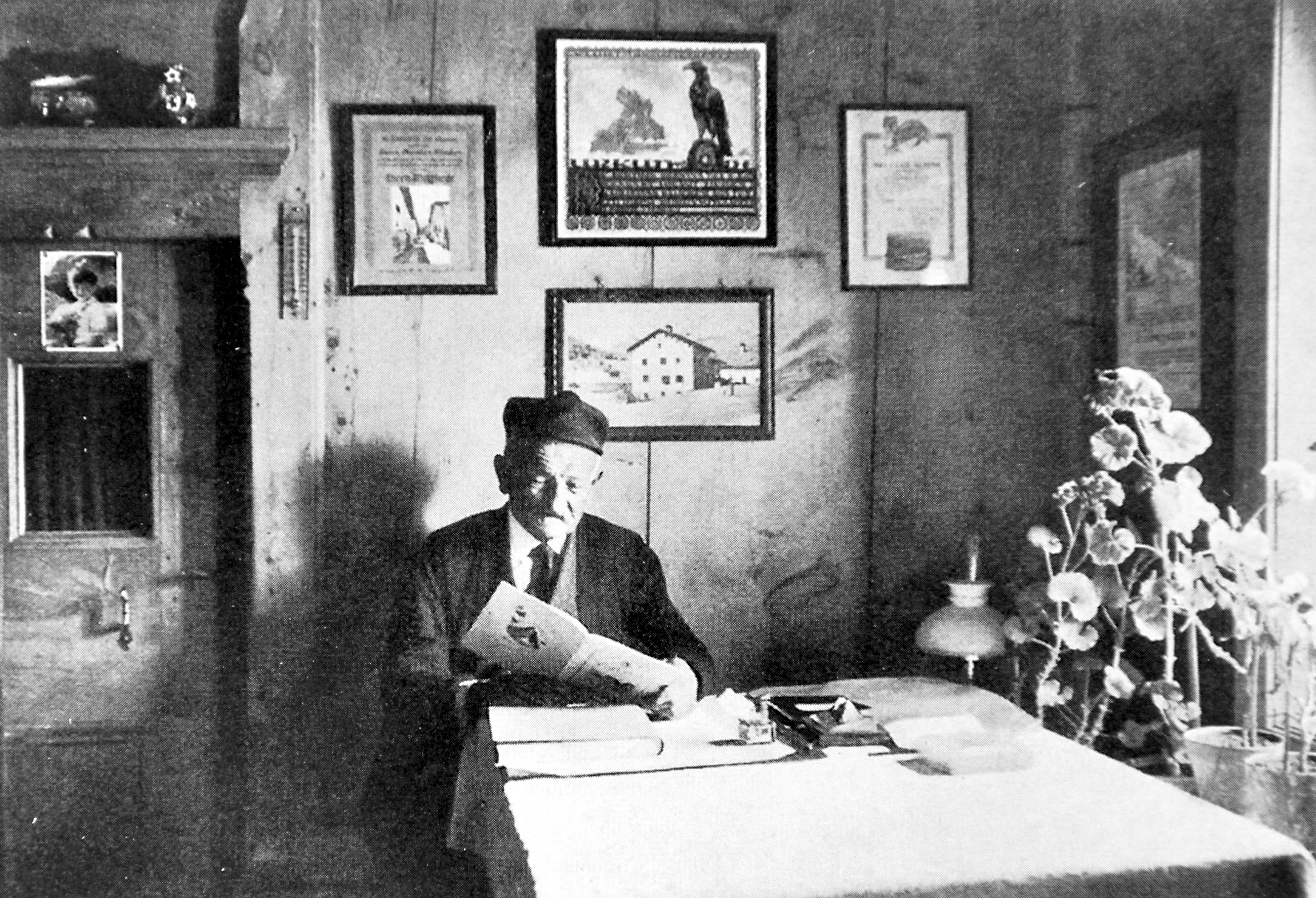 Christian Klucker in seinem Haus im Fextal, um 1920